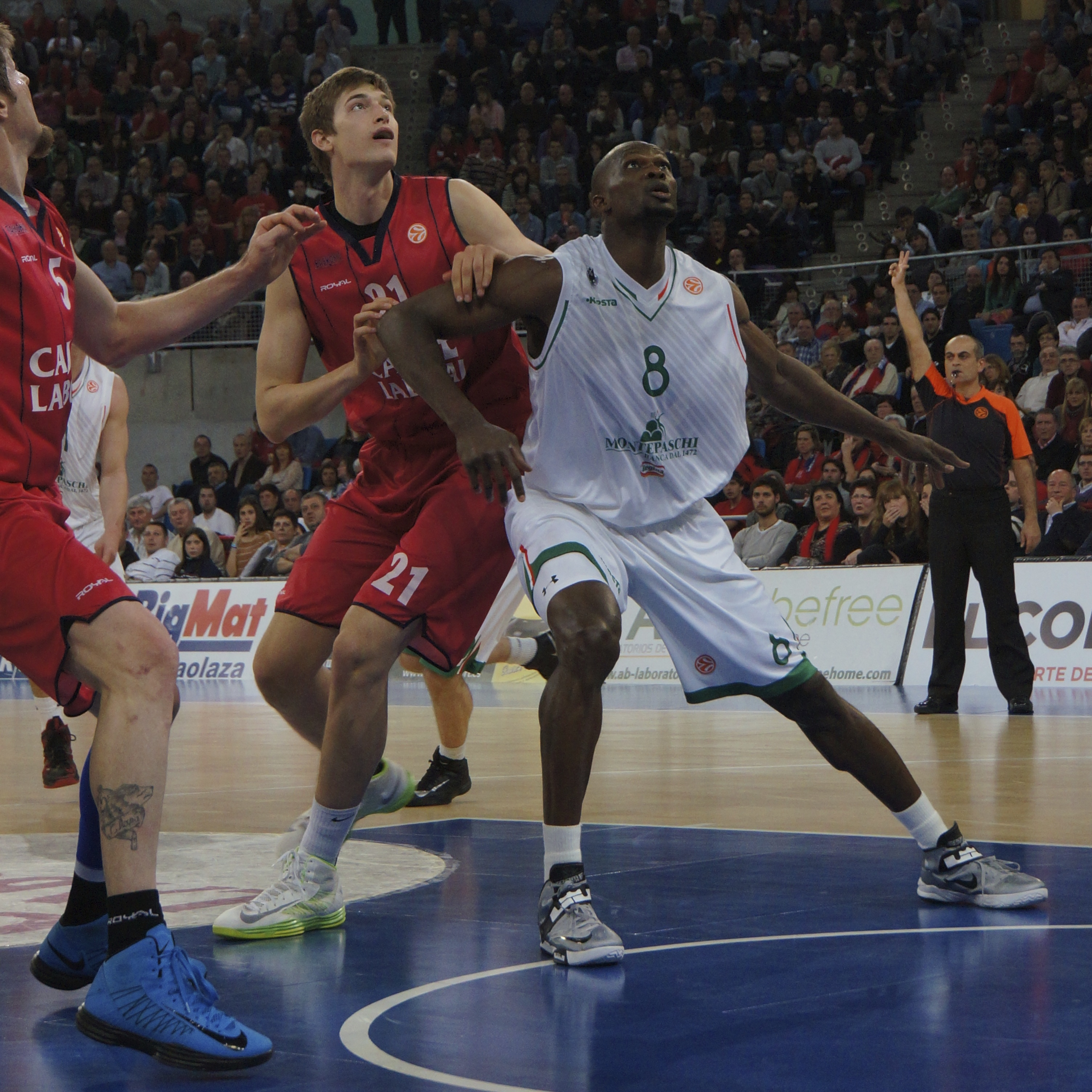 Tibor Pleiß (Saski Baskonia) and Benjamin Eze (Montepaschi Siena)